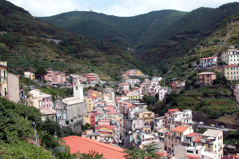 Village de Riomaggiore, Auteur : Emmanuel Beaugrand